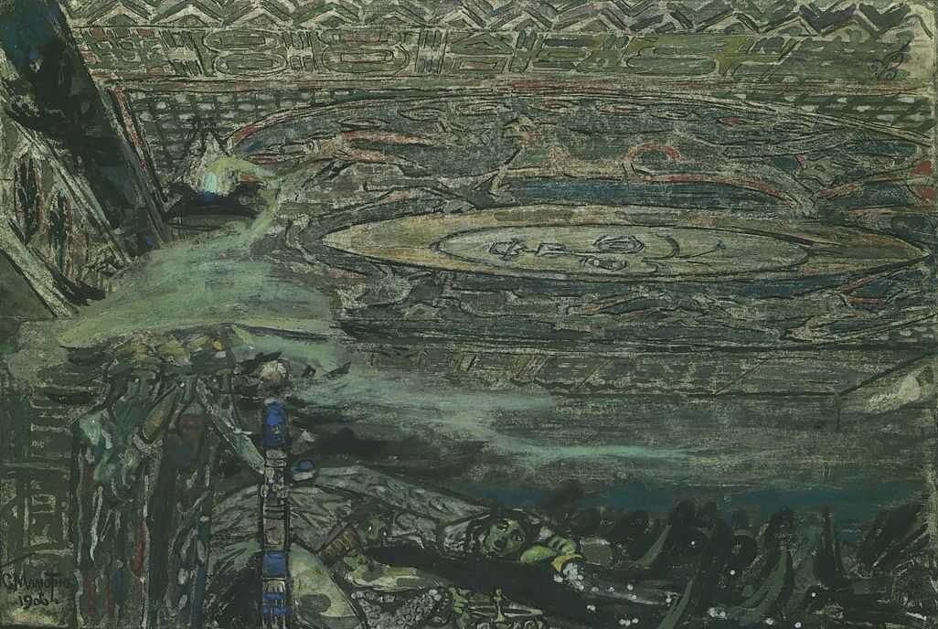 Малютин Сергей Васильевич. Сон Святослава. Иллюстрация к «Слову к полку Игореве». 1906